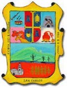 Escudo de Armas de San Carlos Tamaulipas